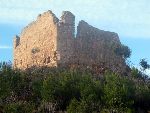 Castell de Montmany a la comarca del Vallès Oriental - Catalunya